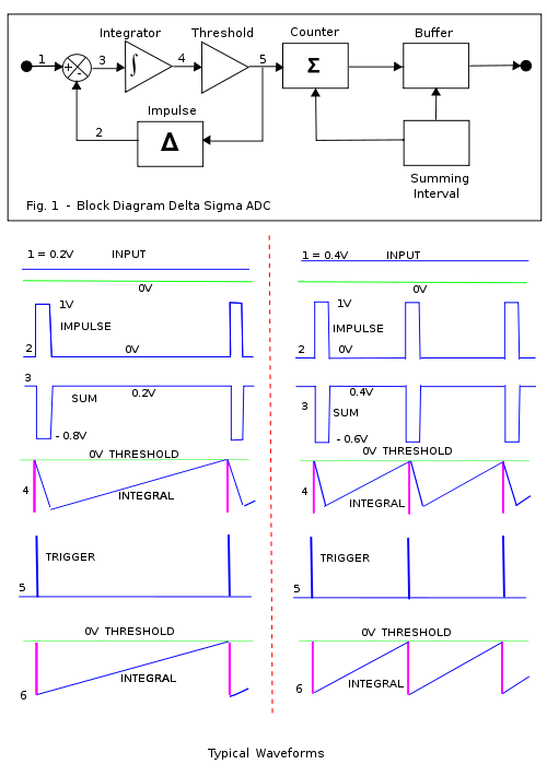 File creato da un utente della Wikipedia inglese (Puffingbilly) che ha permesso di copiare o modificare il documento nei termini della GNU Free Documentation License. Rappresenta un diagramma della modulazione Sigma-Delta.